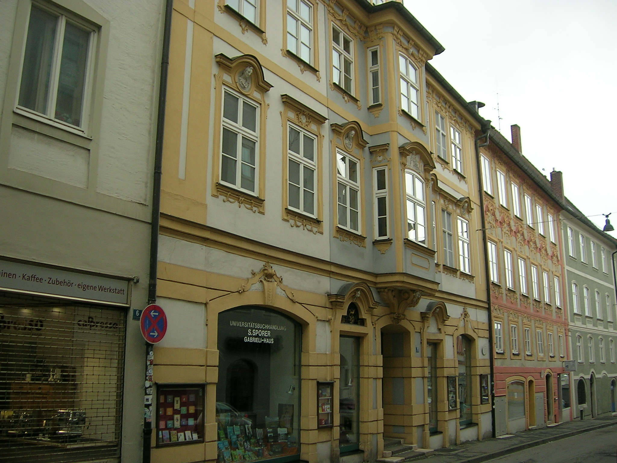 Gabrielistraße Eichstätt.